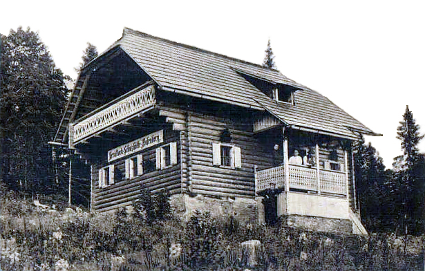 Kernstock-Schutzhütte am Masenberg, 1914 (erbaut 1913)